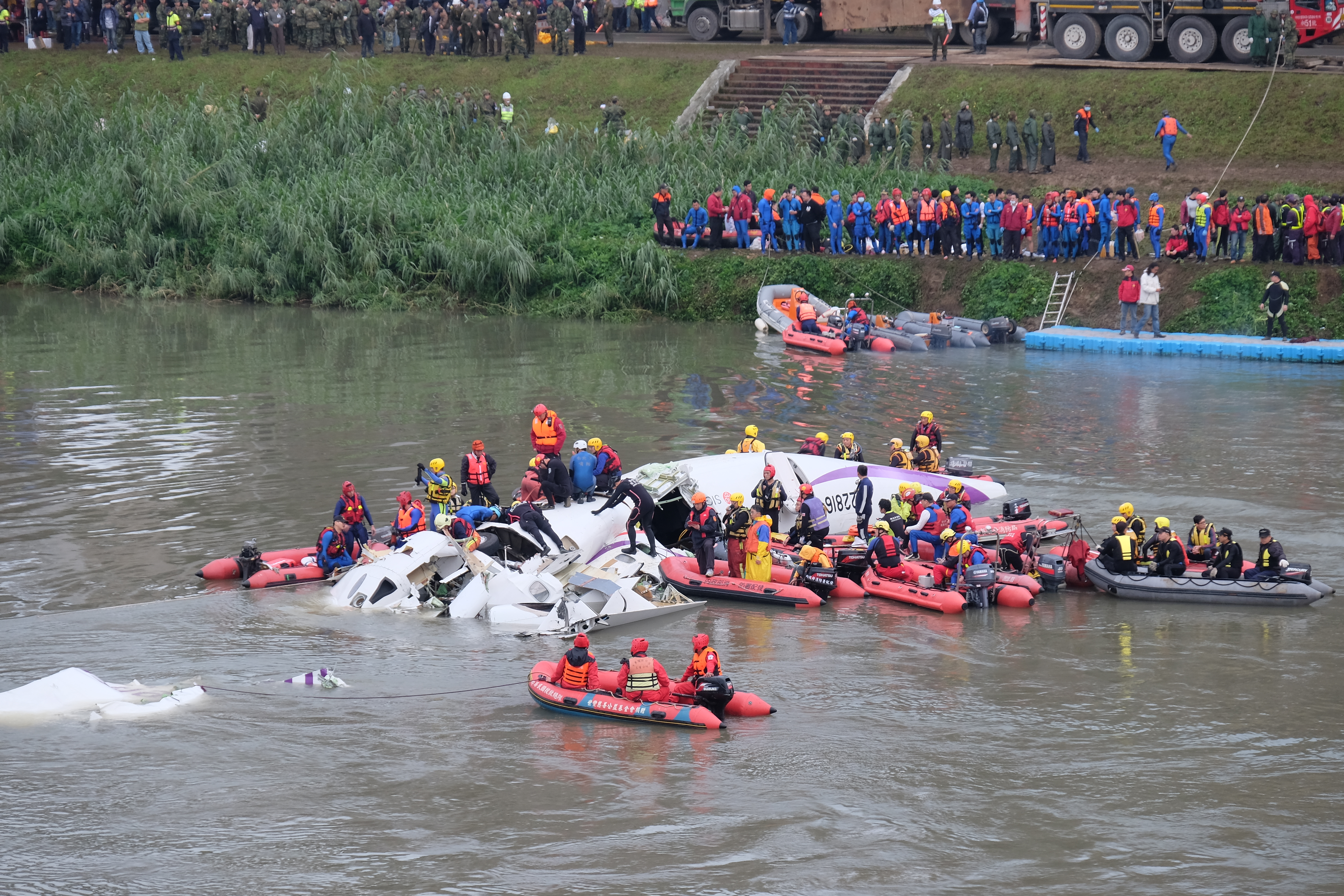 復興航空ATR 72-600 B-22816墜機救援現場機尾特寫，救難人員進入機身尋找罹難者與遺品。